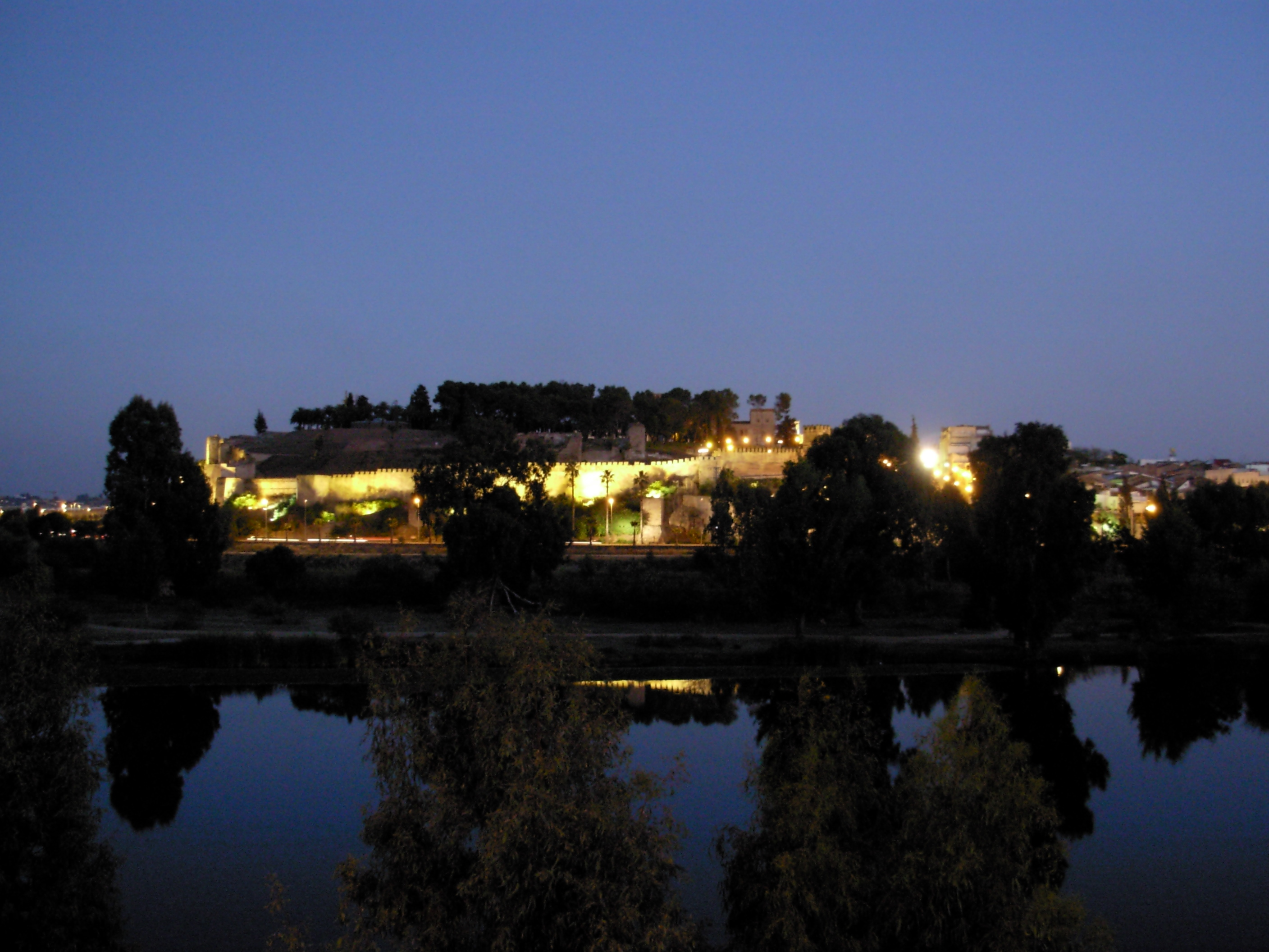 Alcazaba de Badajoz, al anochecer en Abril de 2007